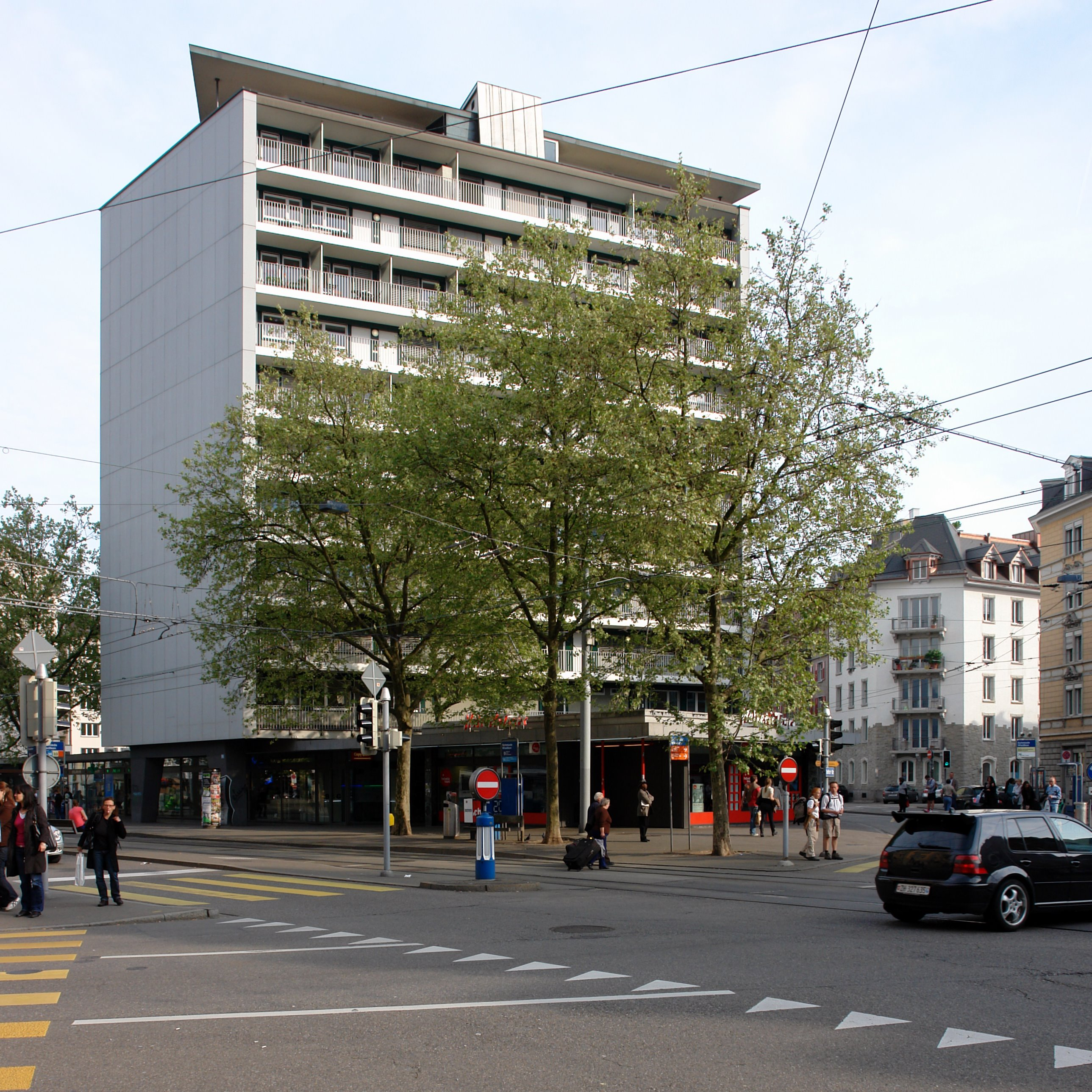 Hochhaus Schmiede Wiedikon. Hochhaus 1957-58 Architekt: Werner Stücheli